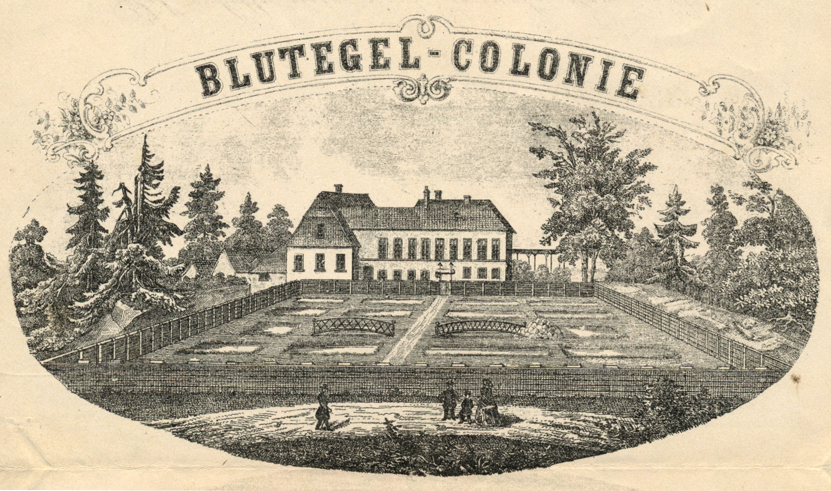 Briefkopf mit der Darstellung der Blutegel-Colonie in Hannover ...